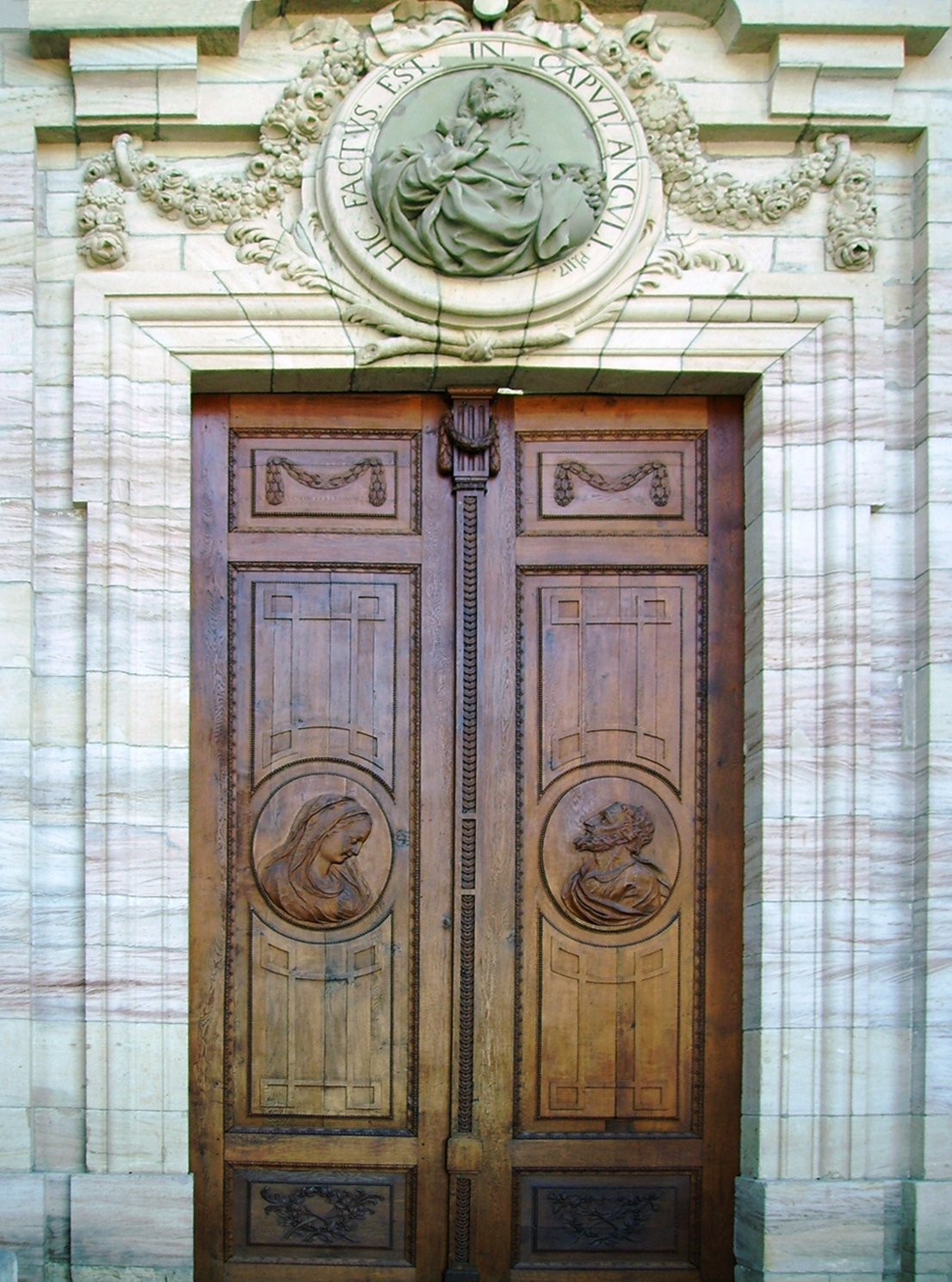 Sankt Blasien Schwarzwald